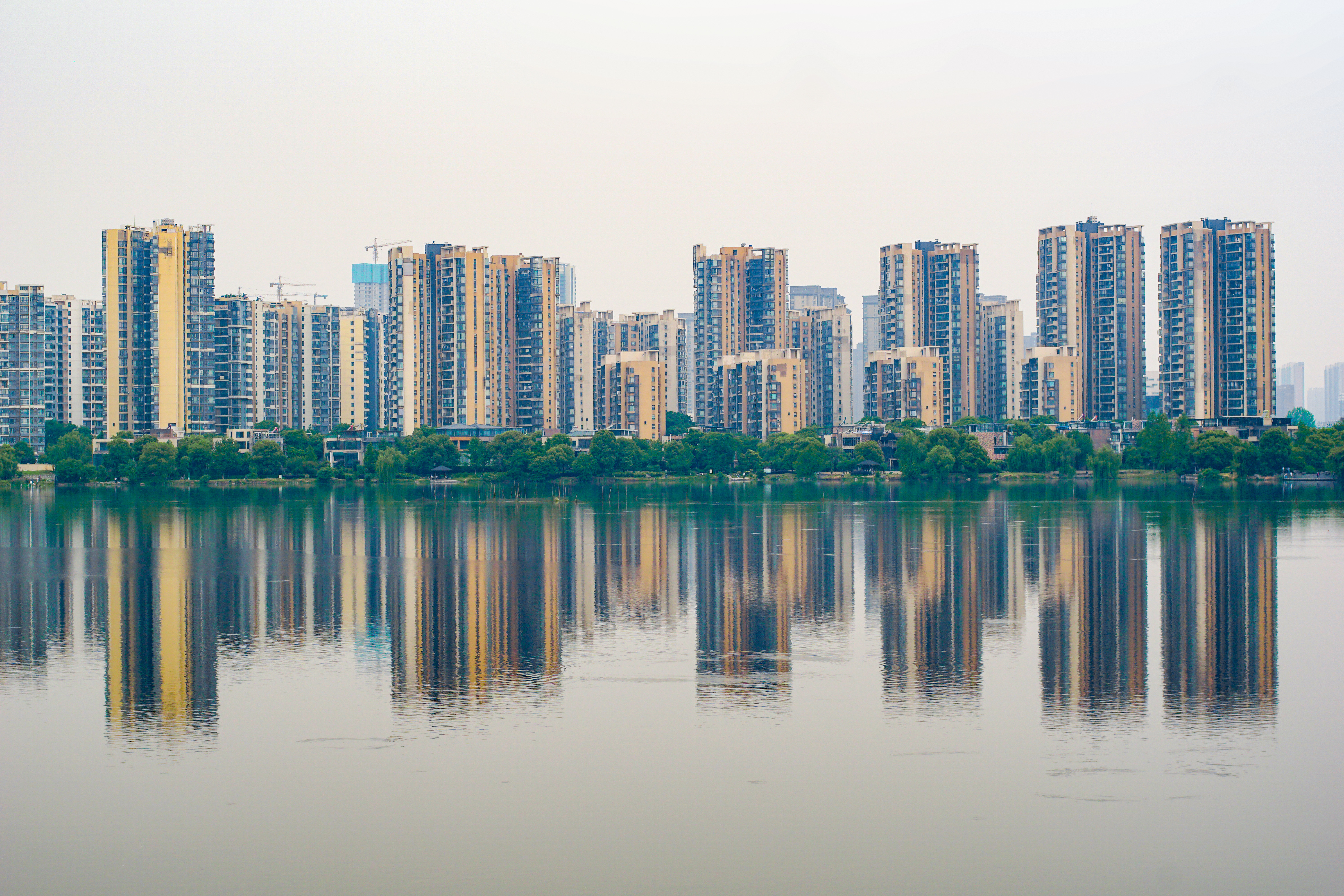 武汉野芷湖